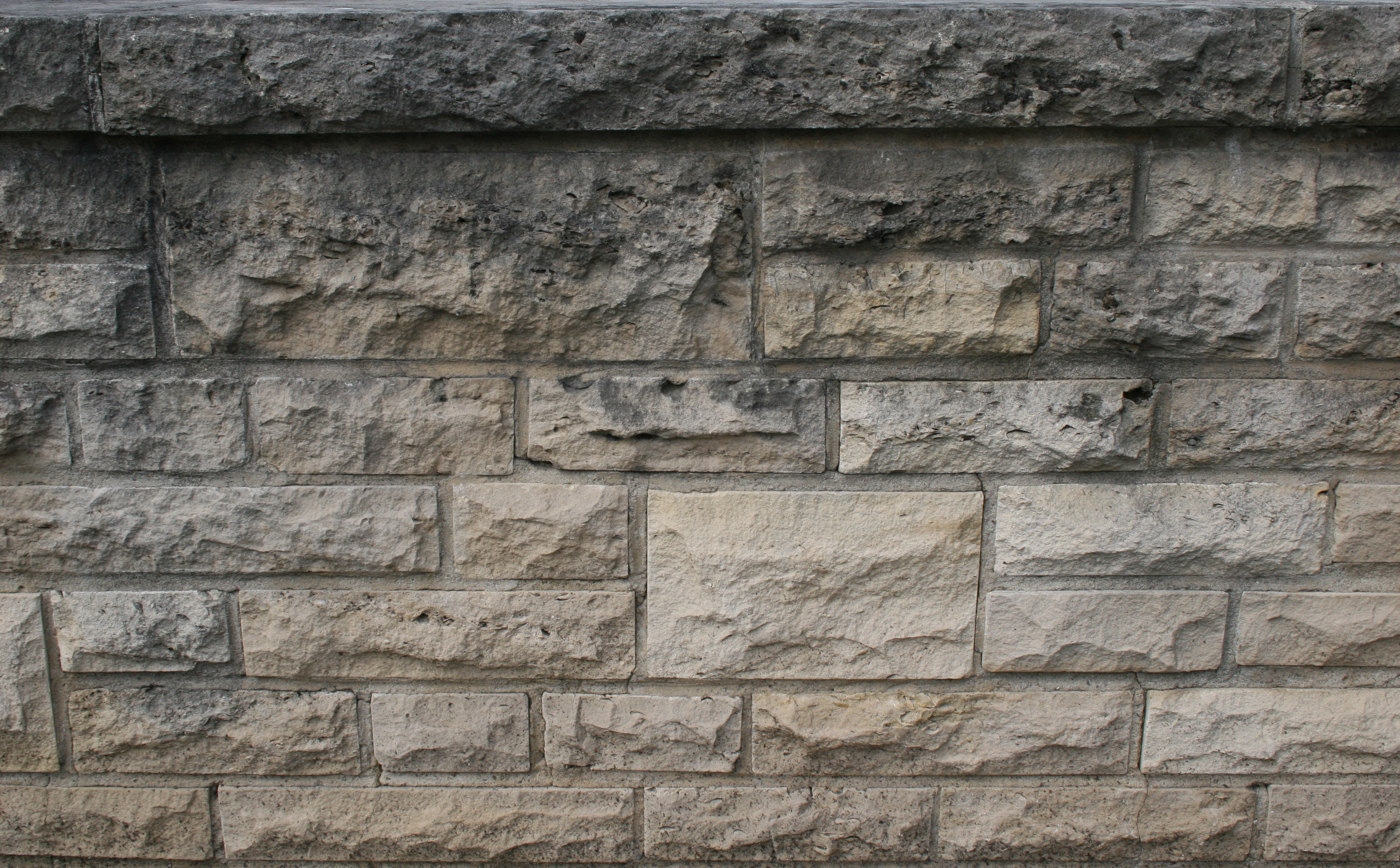 Mauerwerk-unregelmäßig